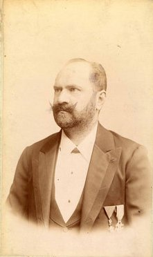 Alszeghy Kálmán (1852-1927) kb. 45-50 éves korában